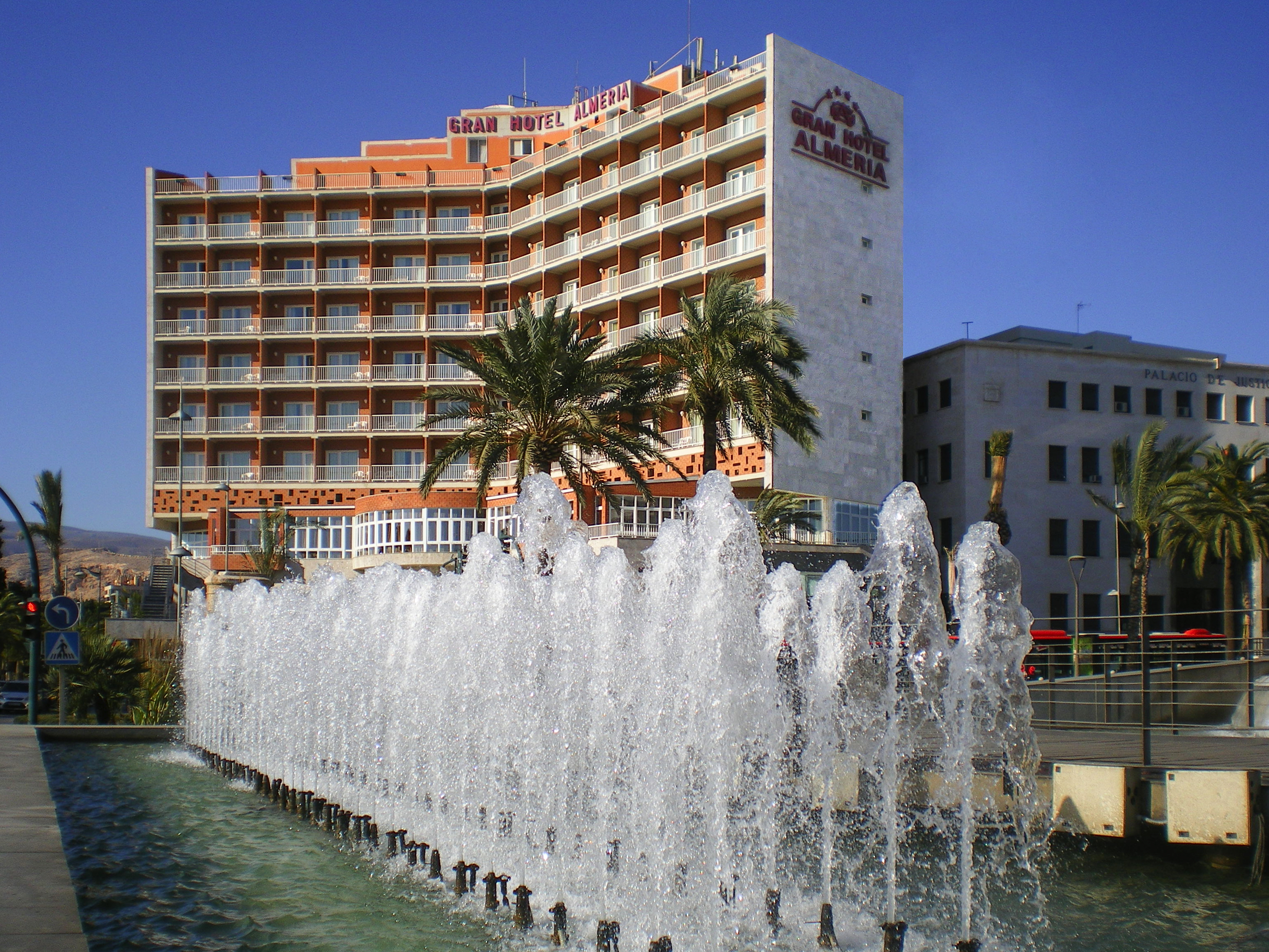 Fotografía del Gran Hotel Almería, Andalucía, España, tomada desde el sureste.